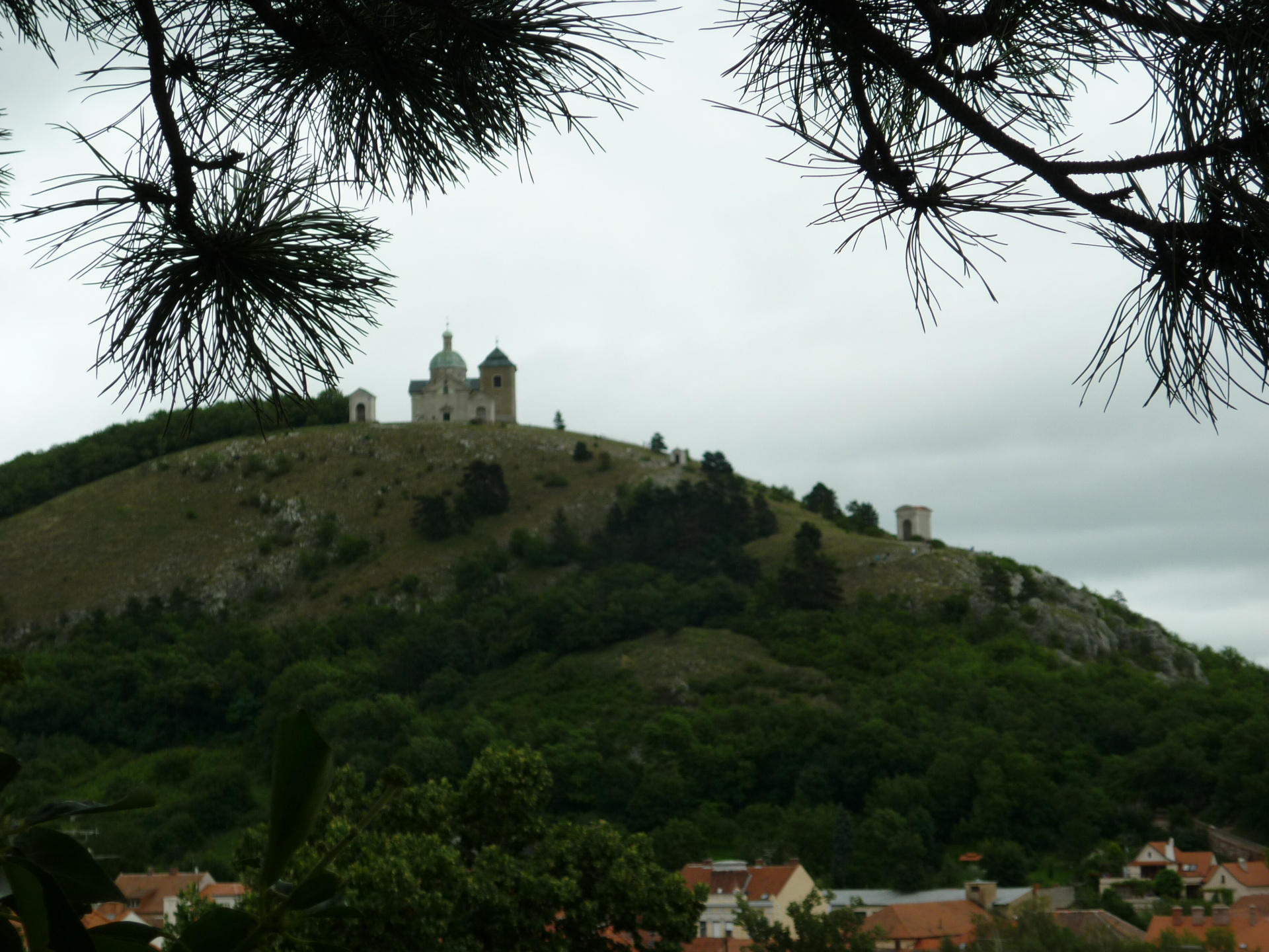 Mikulov na Moravě